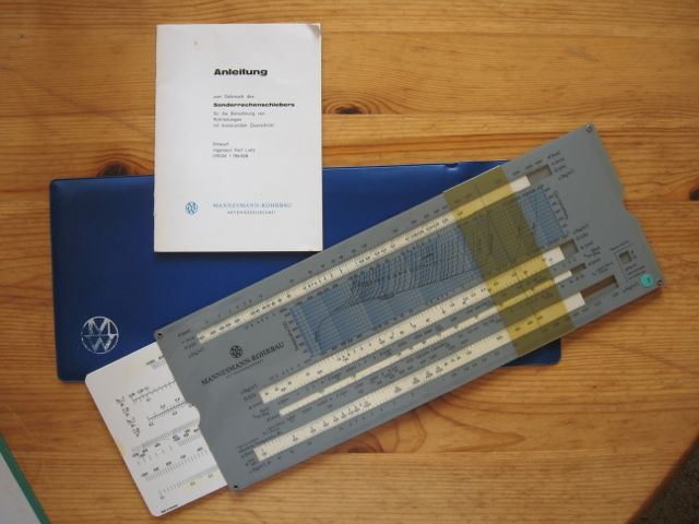 Datenschieber der Mannesmann Rohrbau "für die Berechnung von Rohrleitungen mit kreisrundem Querschnitt" mit Anleitung (16 Seiten). Kunststoff.